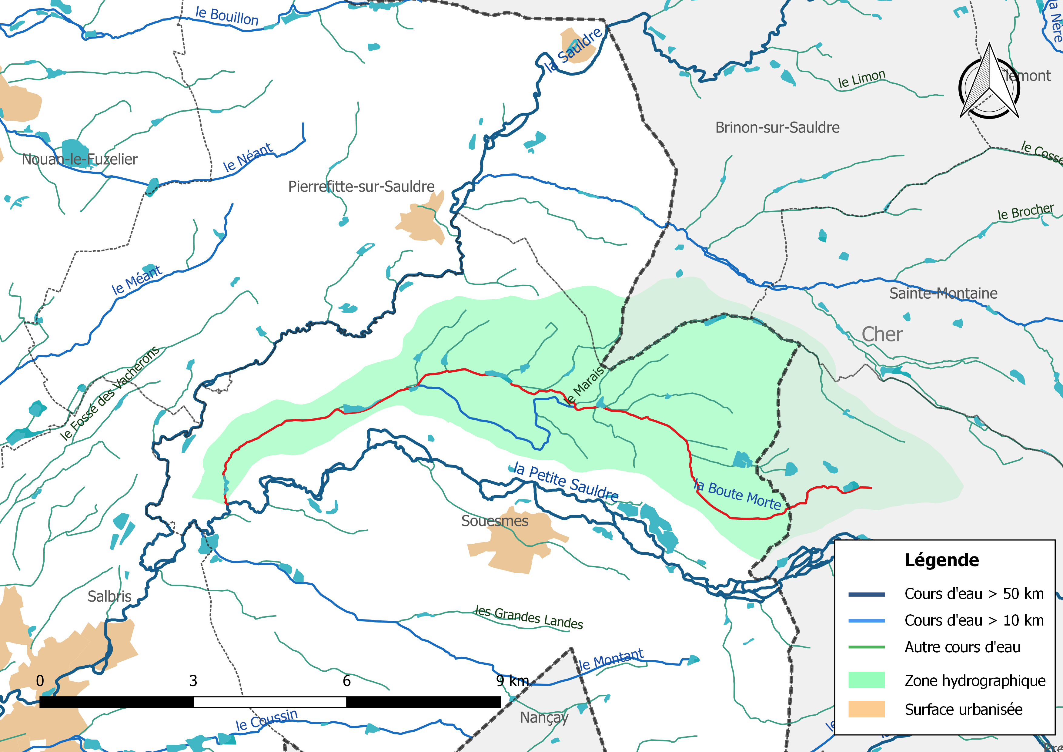 Carte du cours d'eau « la Boute Morte » et de son bassin versant (zone hydrographique dans laquelle il s'insère).